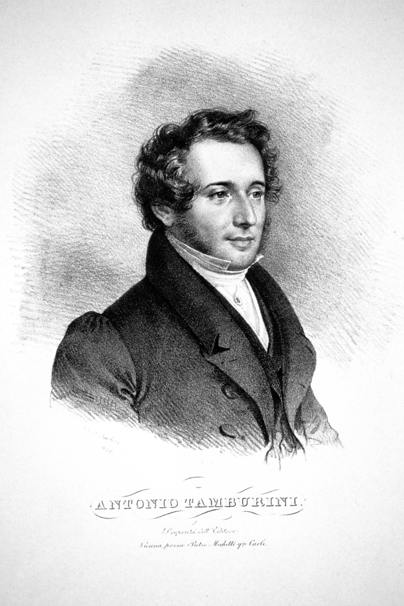 Antonio Tamburini (1800-1876) italienischer Opernsänger (Baritom)